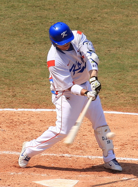 Kim Dong-Joo